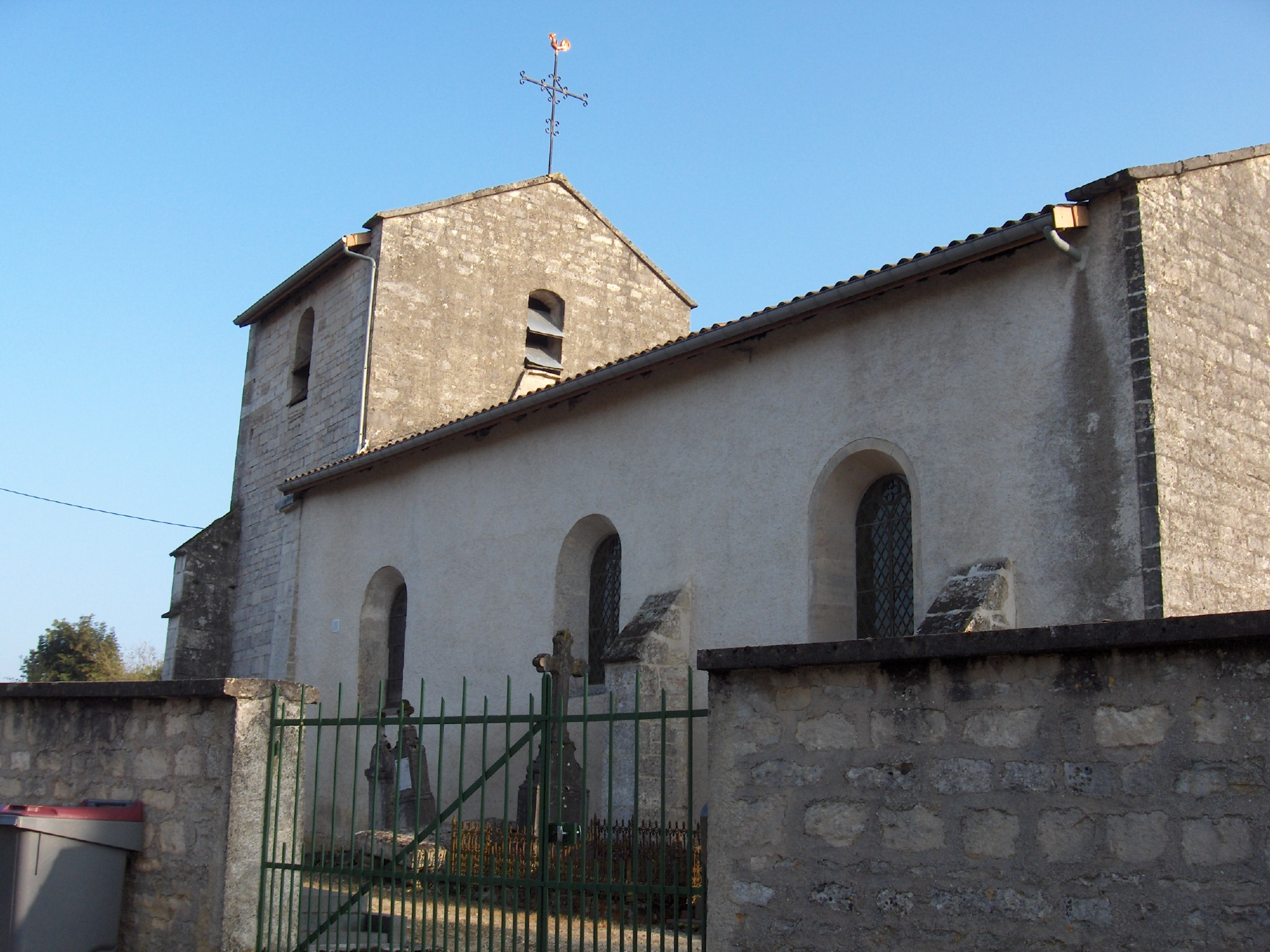 L'église Saint-Félix de Saudron en Haute-Marne